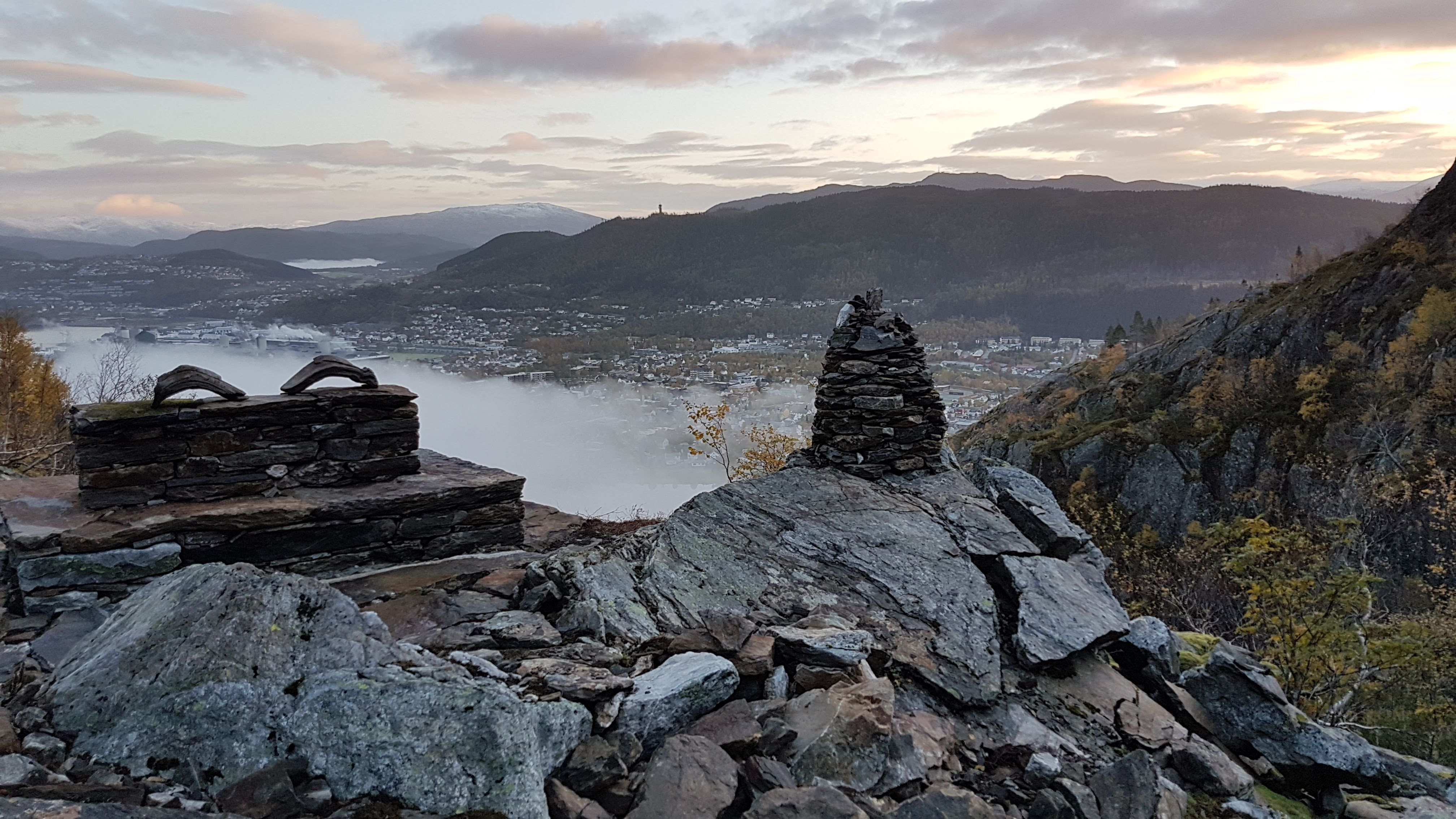 På vei opp Helgelandstrappa.